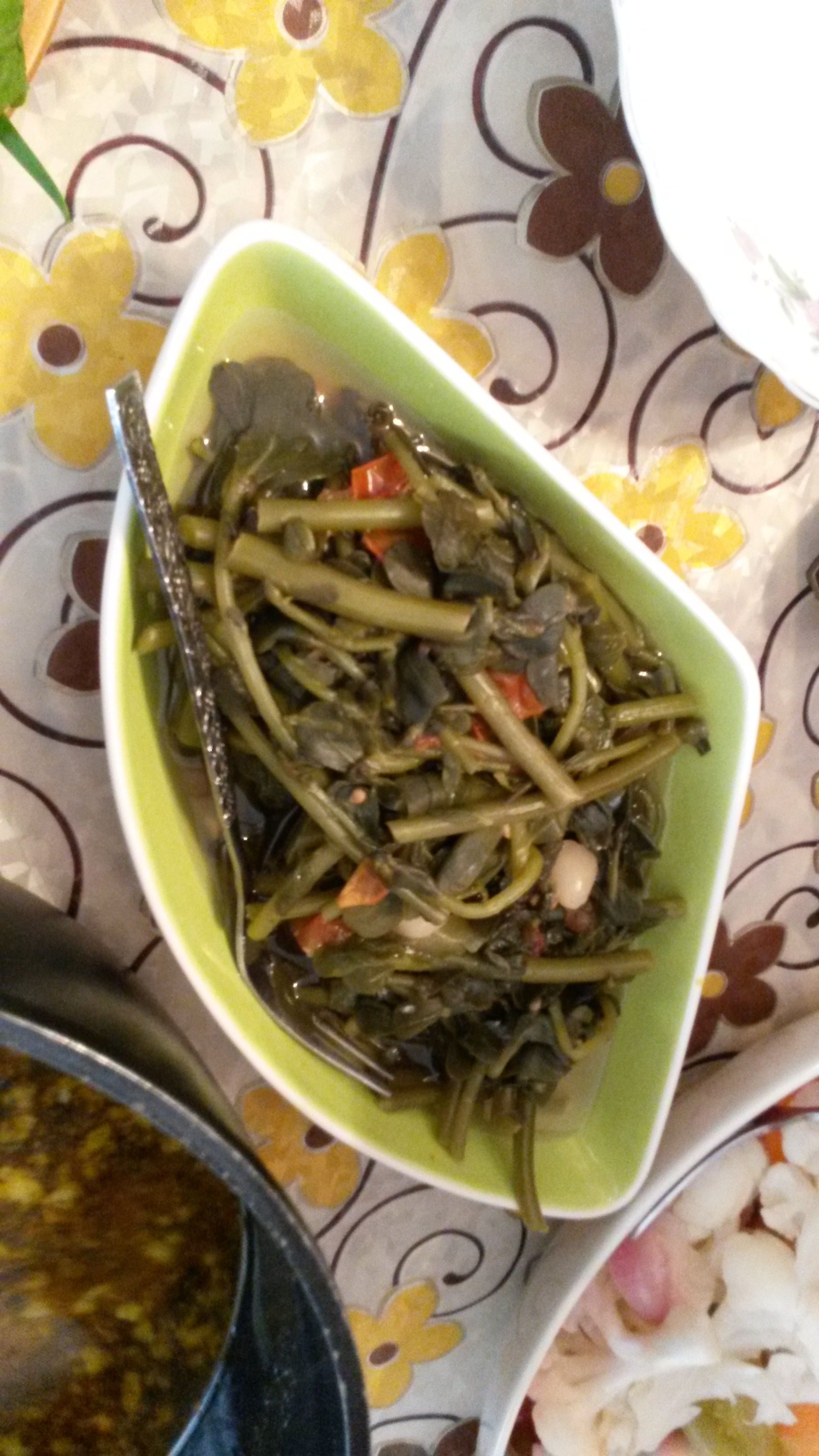 Դանդուռի թթու ترشی دندور pickled dandoor